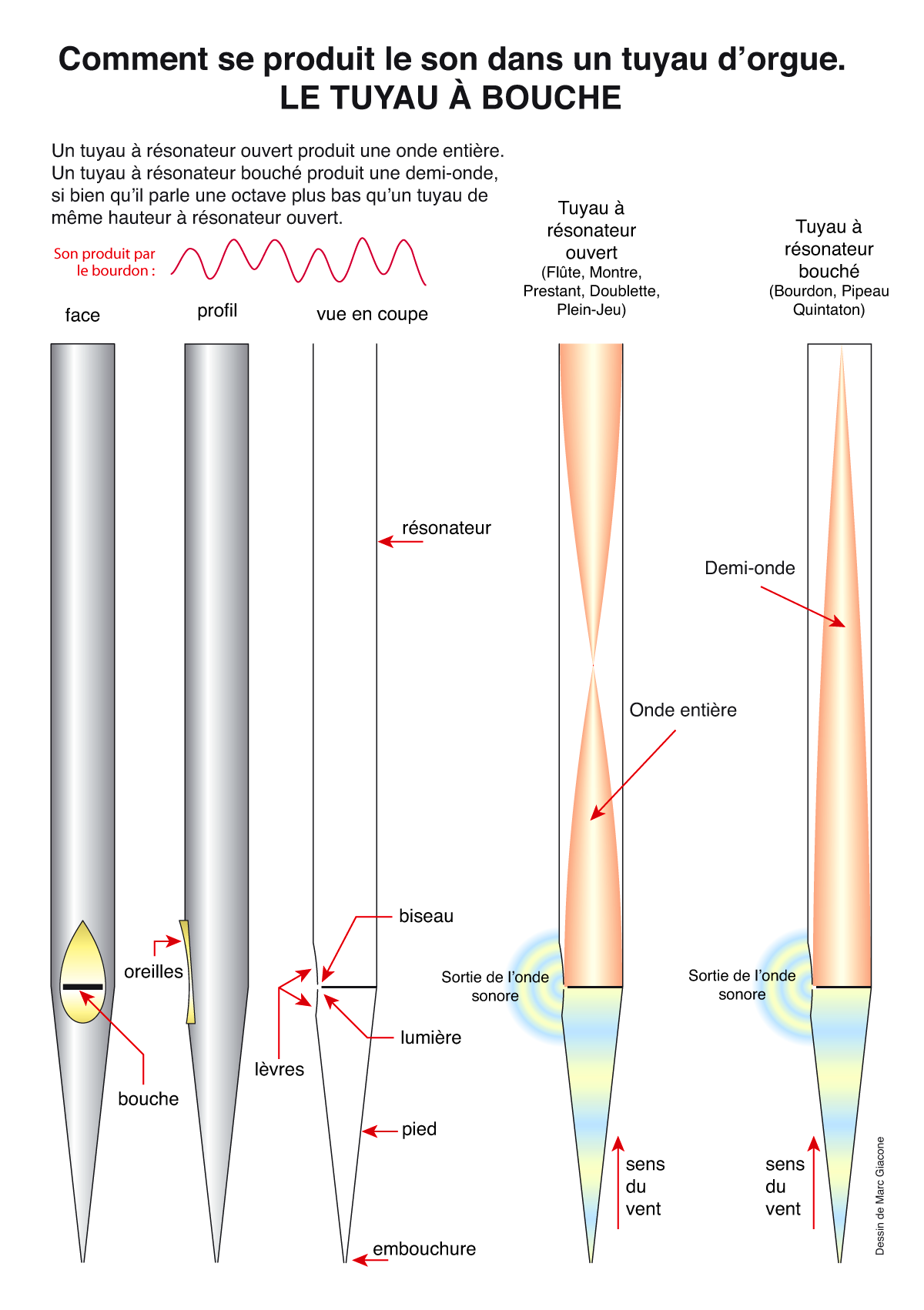 schéma du tuyau sonore - exemple du tuyau d'orgue